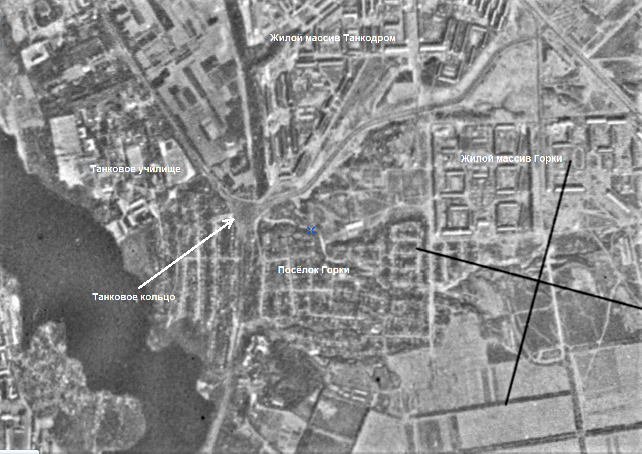 Казань. Танковое кольцо в районе посёлка Горки